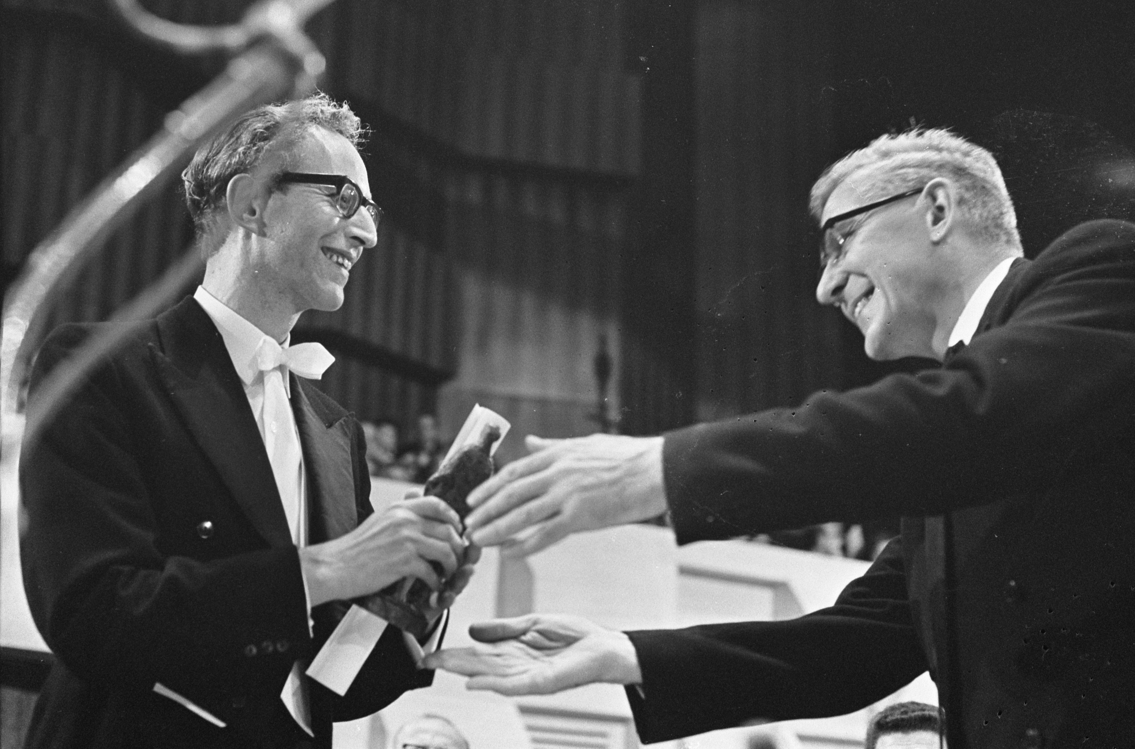 Grand Gala du Disque Klassiek . nummer 7 Kees Otten ontvangt Edison Datum: 6 oktober 1967